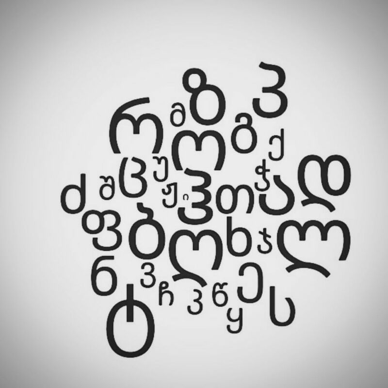 ქართული ანბანი